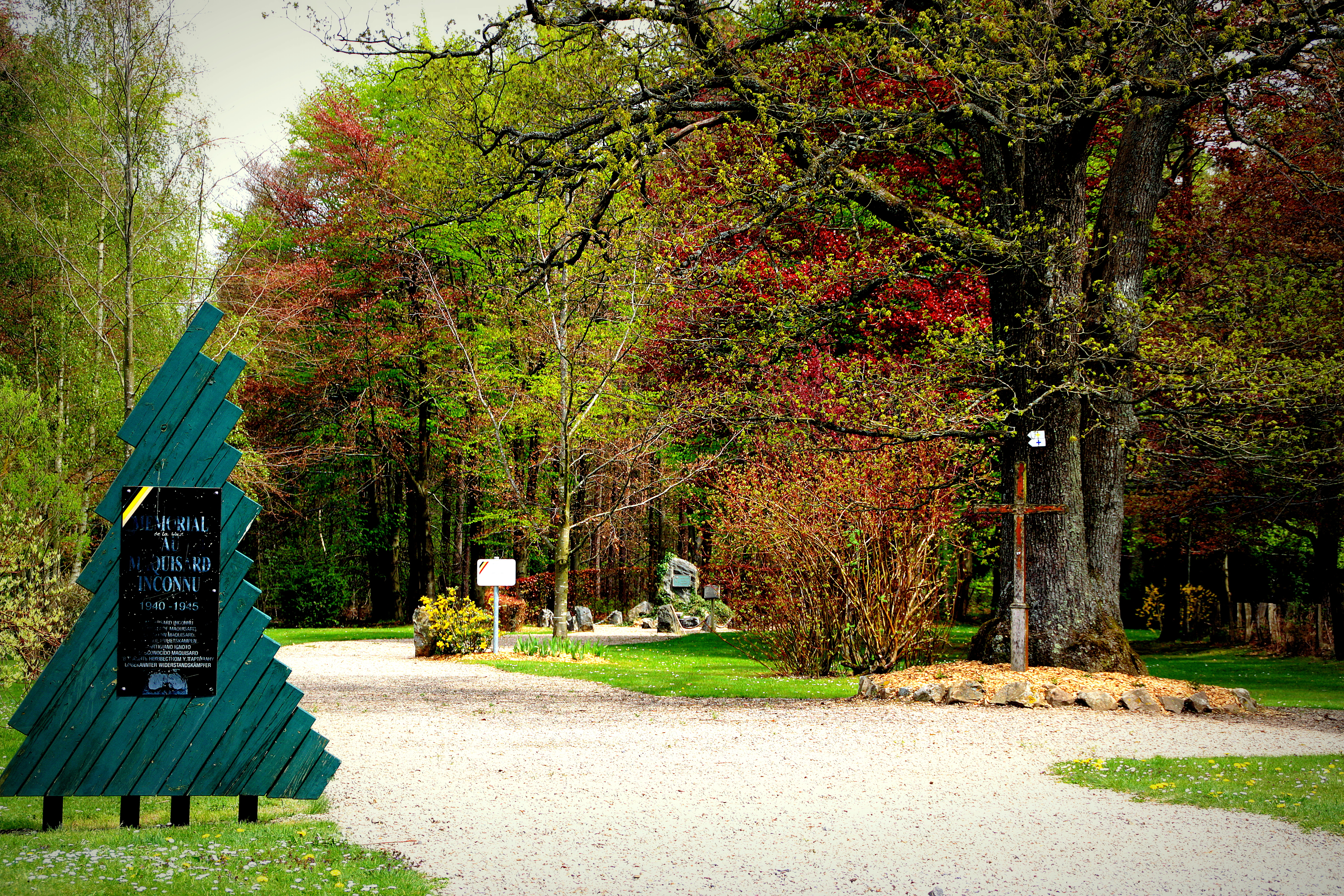 De Mémorial national au maquisard inconnu um Col du Maquisard